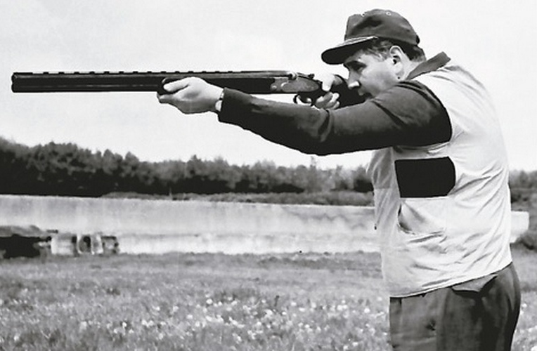 Ion Dumitrescu